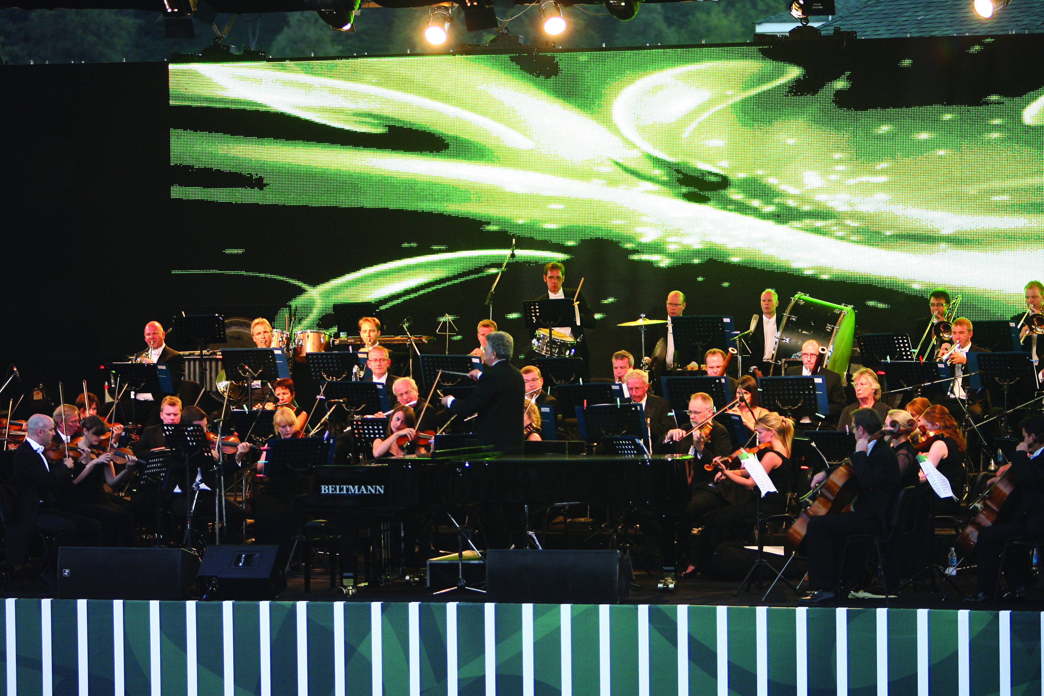 Qəbələ Beynəlxalq musiqi festivalıa